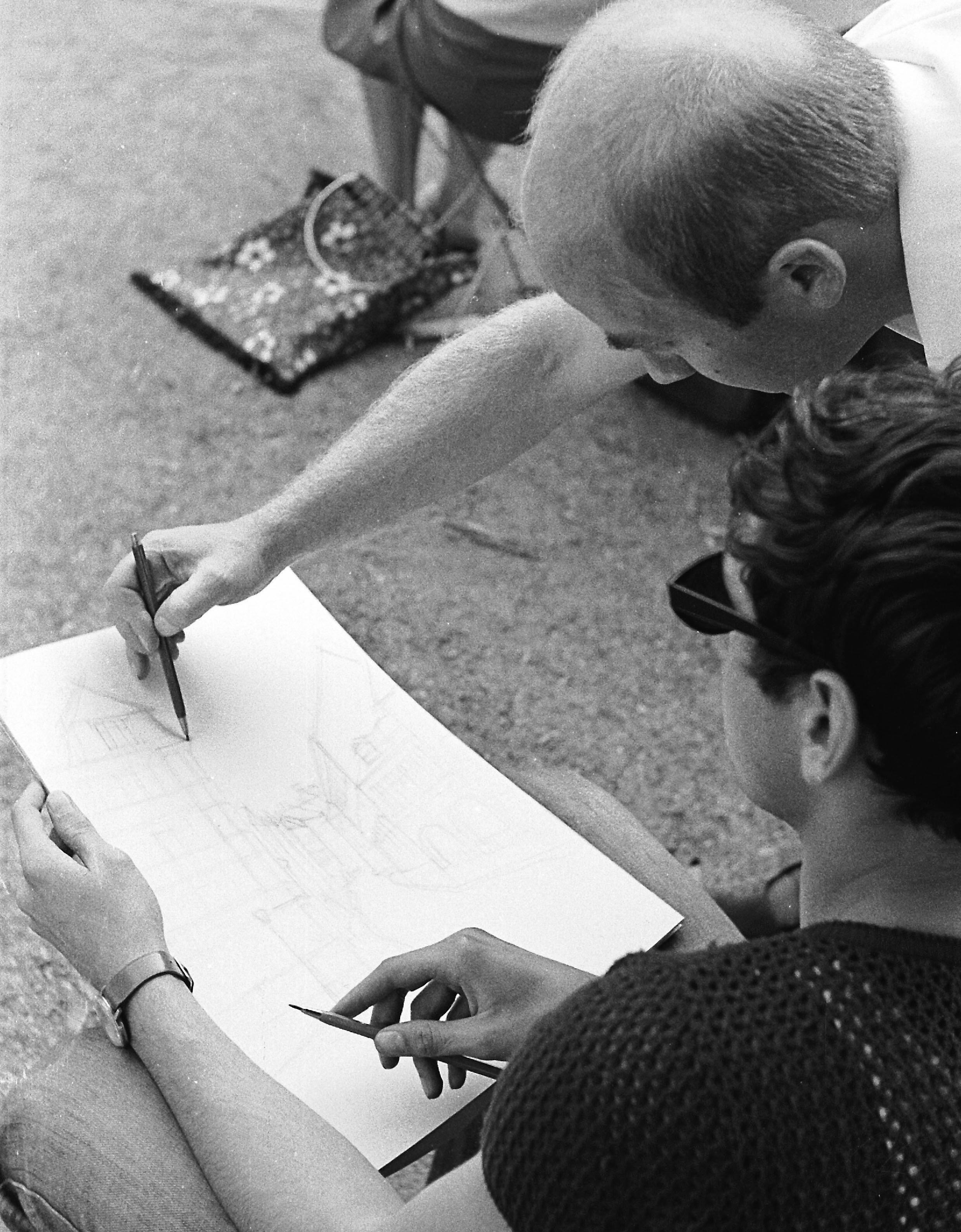 31.08.1970 Görlitz: Dozent Dr. Karlheinz Georgi von der Technischen Universität Dresden unterweist einen Architekturstudenen des Studienjahrganges 1969 im Fach Freihandzeichnen. Zeichenexkursion im 3. Semester vom 31.08. - 02.09.1970. [F19700831A013]19700831130NR.JPG(c)Blobelt